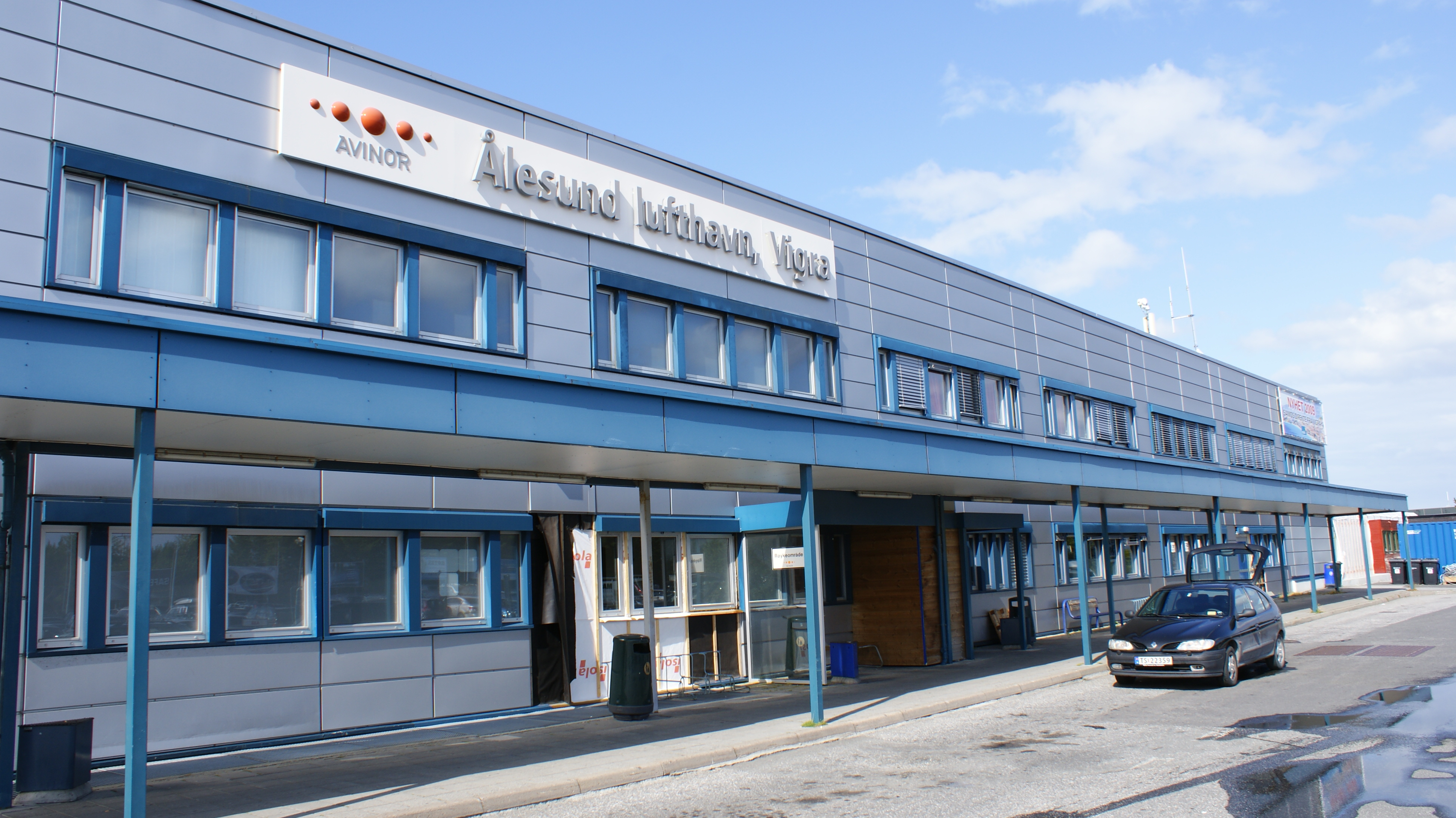 Ålesund Airport, Sunnmøre, Møre og Romsdal, Norway. Terminal exterior.